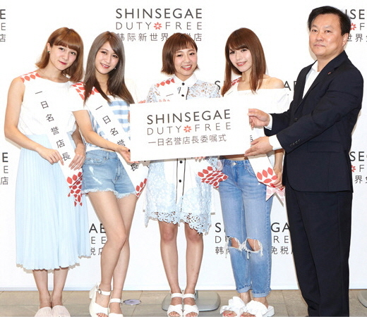 꼭 남기고픈 그 순간! -신세계면세점에 -아이돌이 떴다!